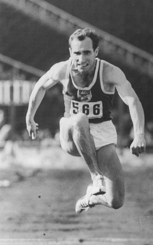 Manfred Hinze Zentralbild Dressel 25.7.1960 Deutsche Leichtathletikmeisterschaften im Zentralstadion in Leipzig vom 22.- 24.07.1960 UBz: Den zweiten Platz im Dreisprung erkämpfte sich Manfred Hinze.